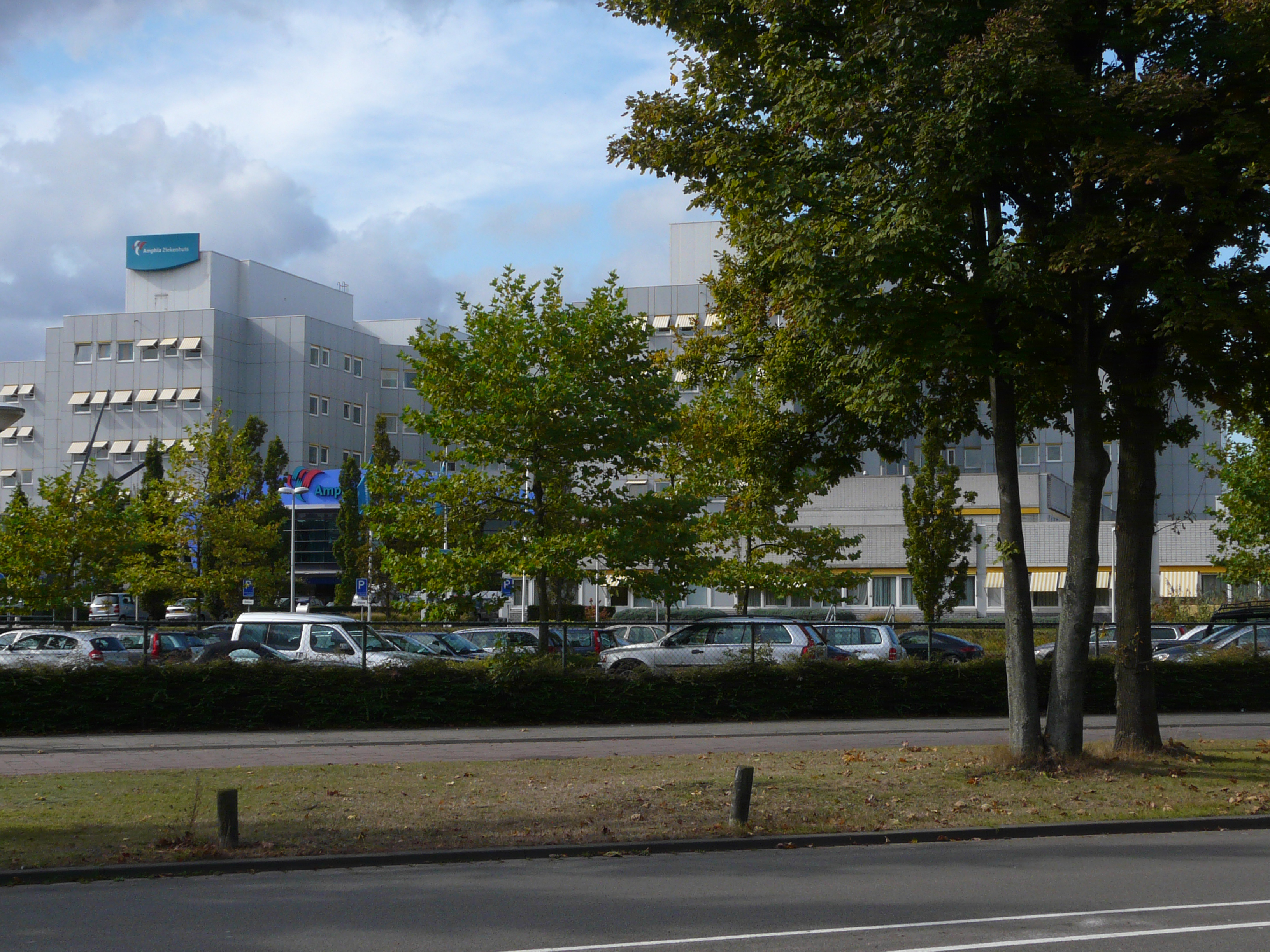 Zicht op een deel van het voormalige gebouw van het Amphia ziekenhuis gevestigd aan de Molengracht 21 in Breda